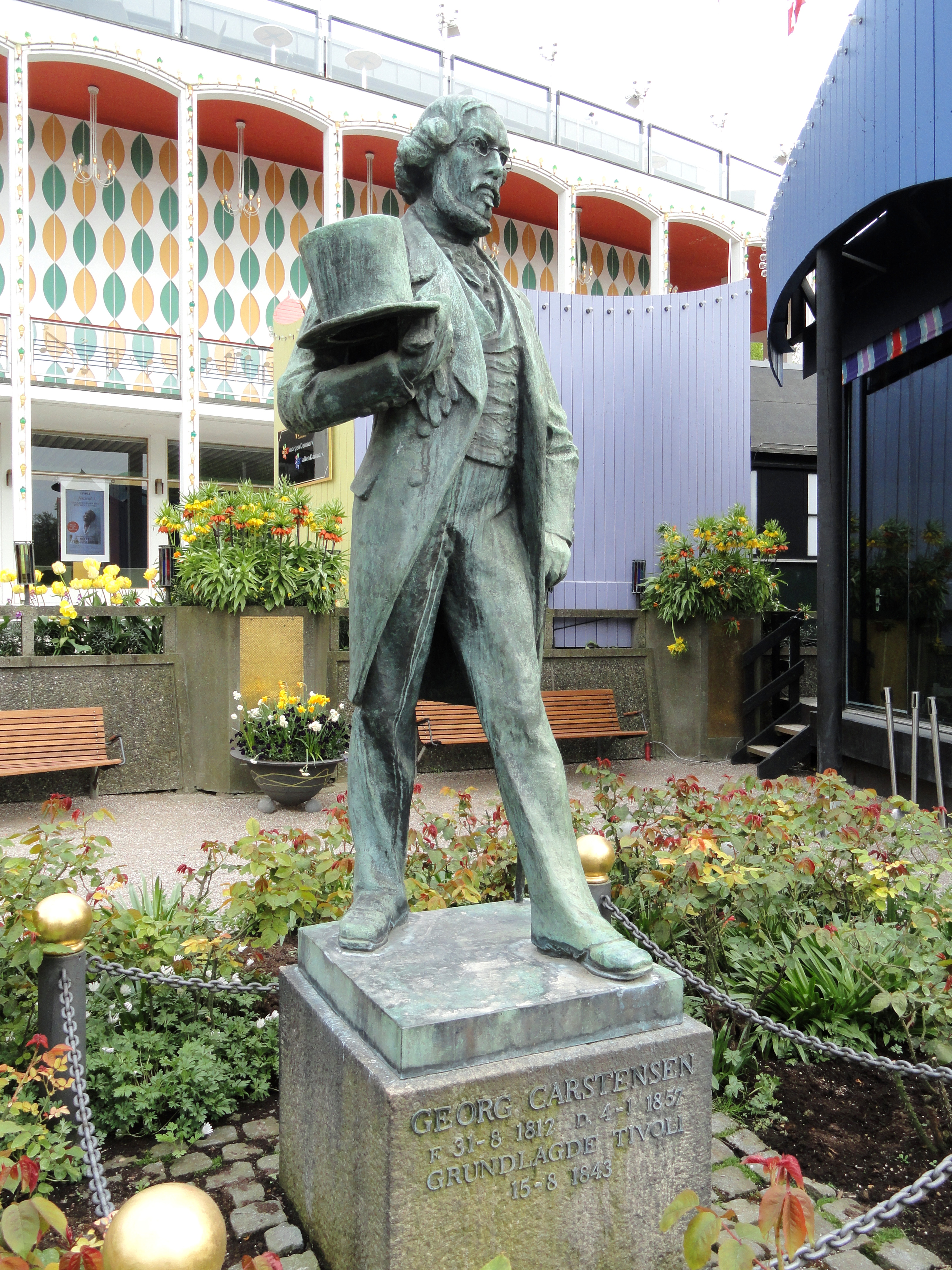 Tivoli Gardens, Copenhagen, Denmark.